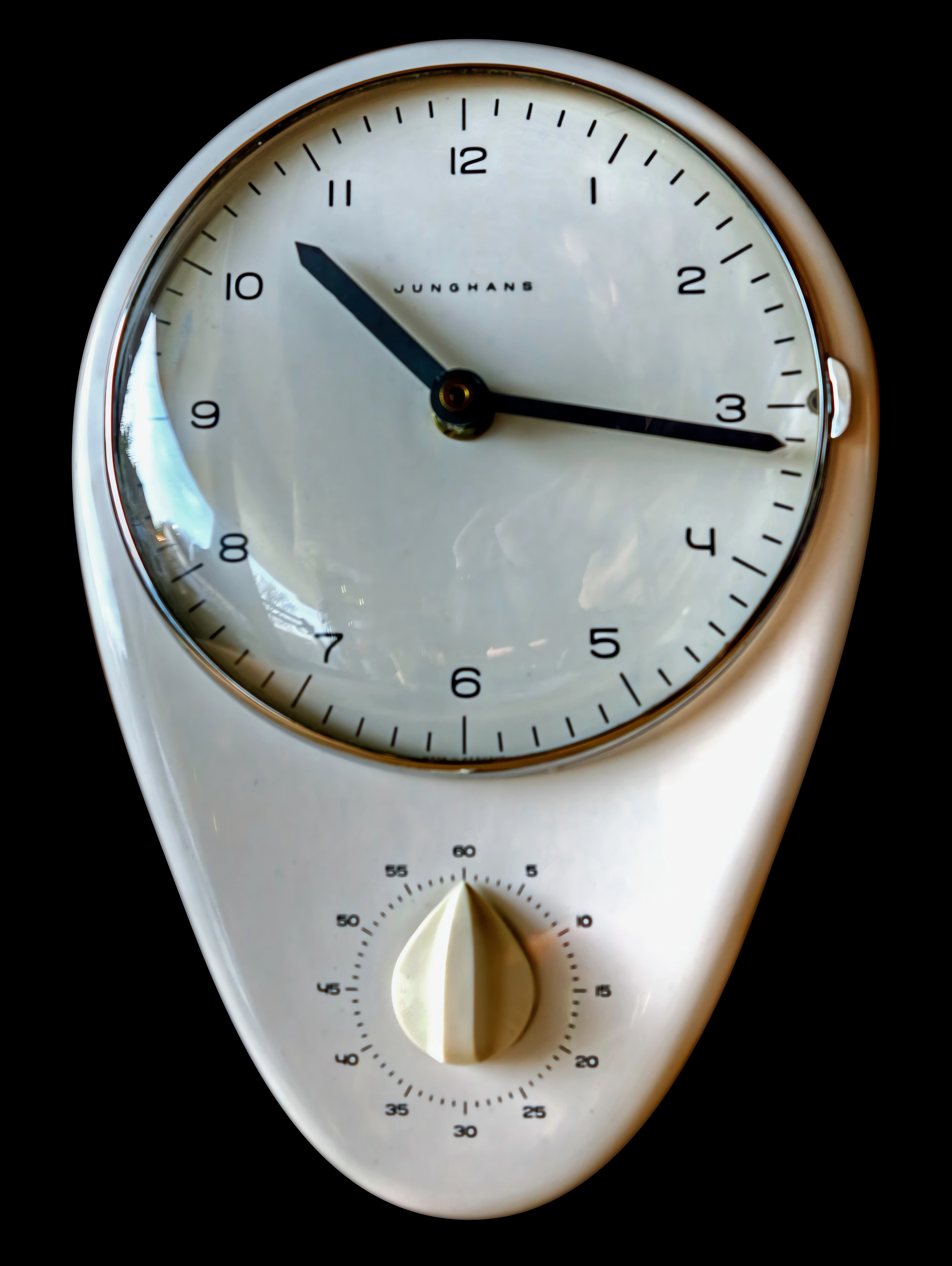 Junghans Küchenuhr mit Kurzzeitwecker, Design: Max Bill, 1956